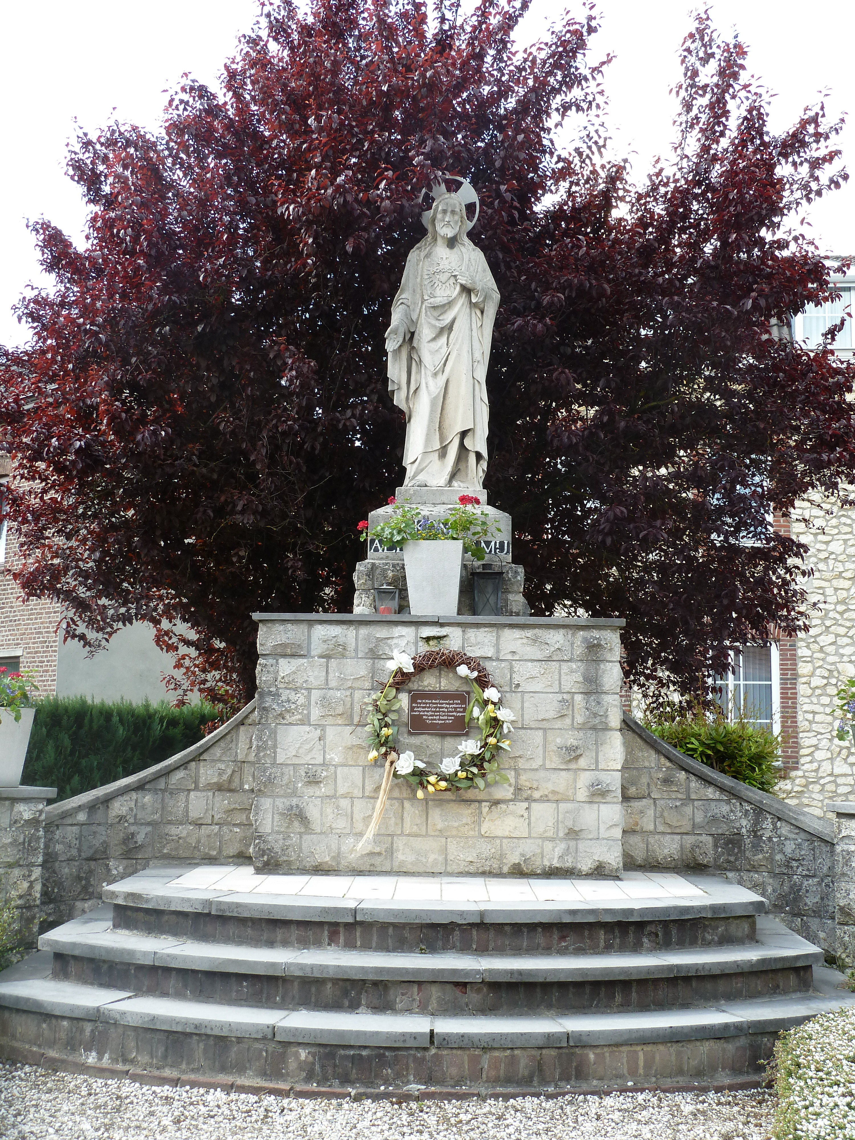 Heilig Hartbeeld, Eys, Gulpen-Wittem, Limburg, Nederland